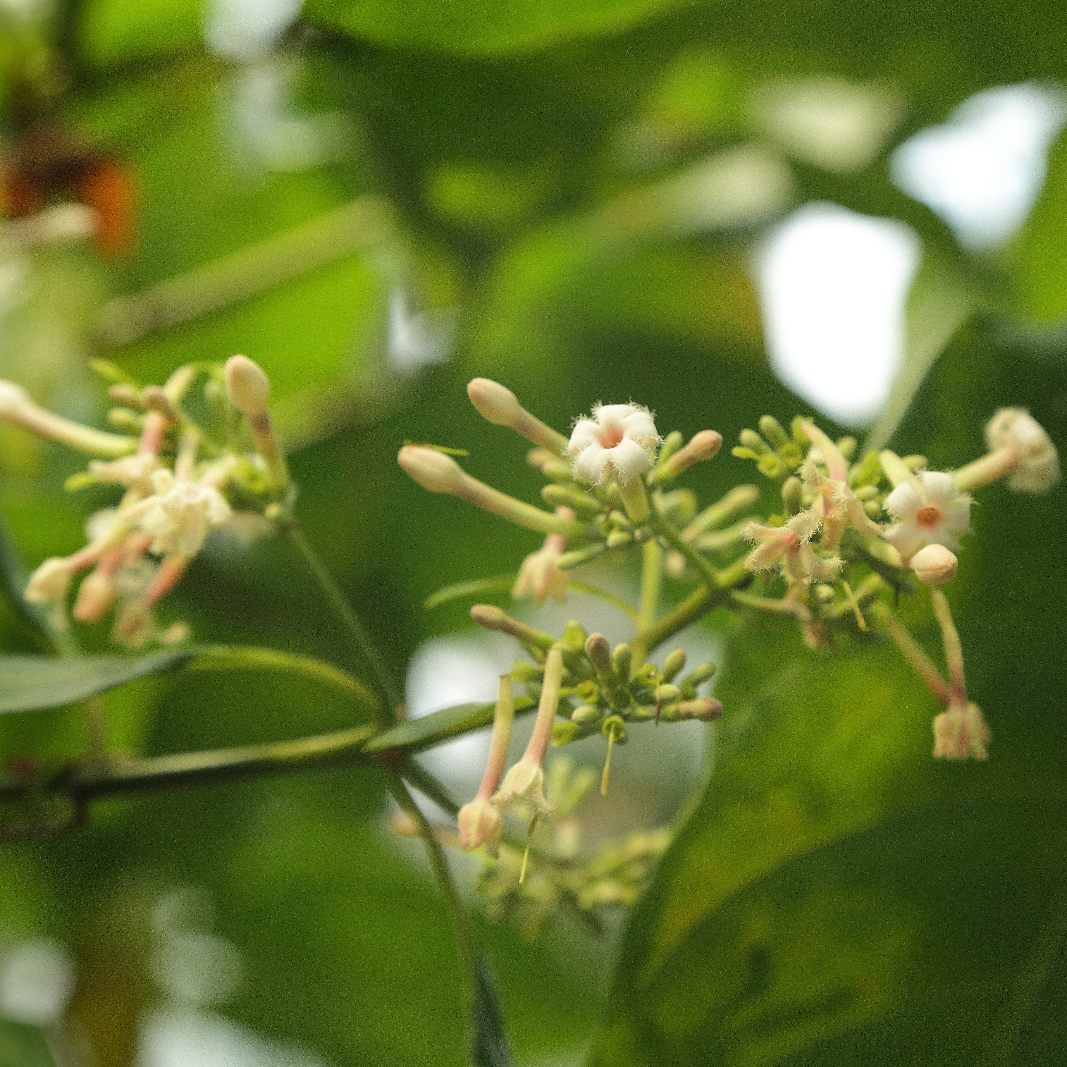 Cinchona pubescens i Bergianska trädgården.